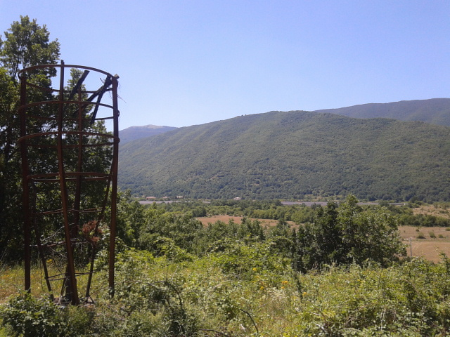 La Serra Lunga vista dal falò di Sant'Antonio a Collelongo